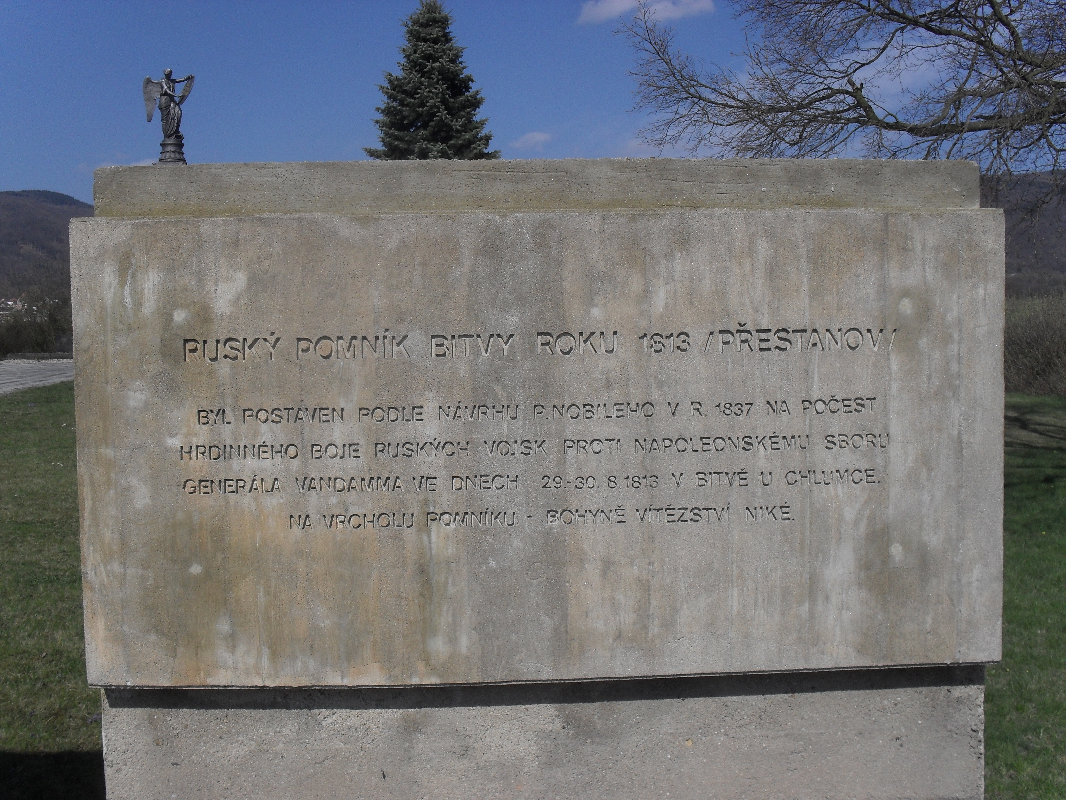 Ruský památník bitvy o Chlumec, kde roku 1813 došlo k porážce Napoleonských vojsk.